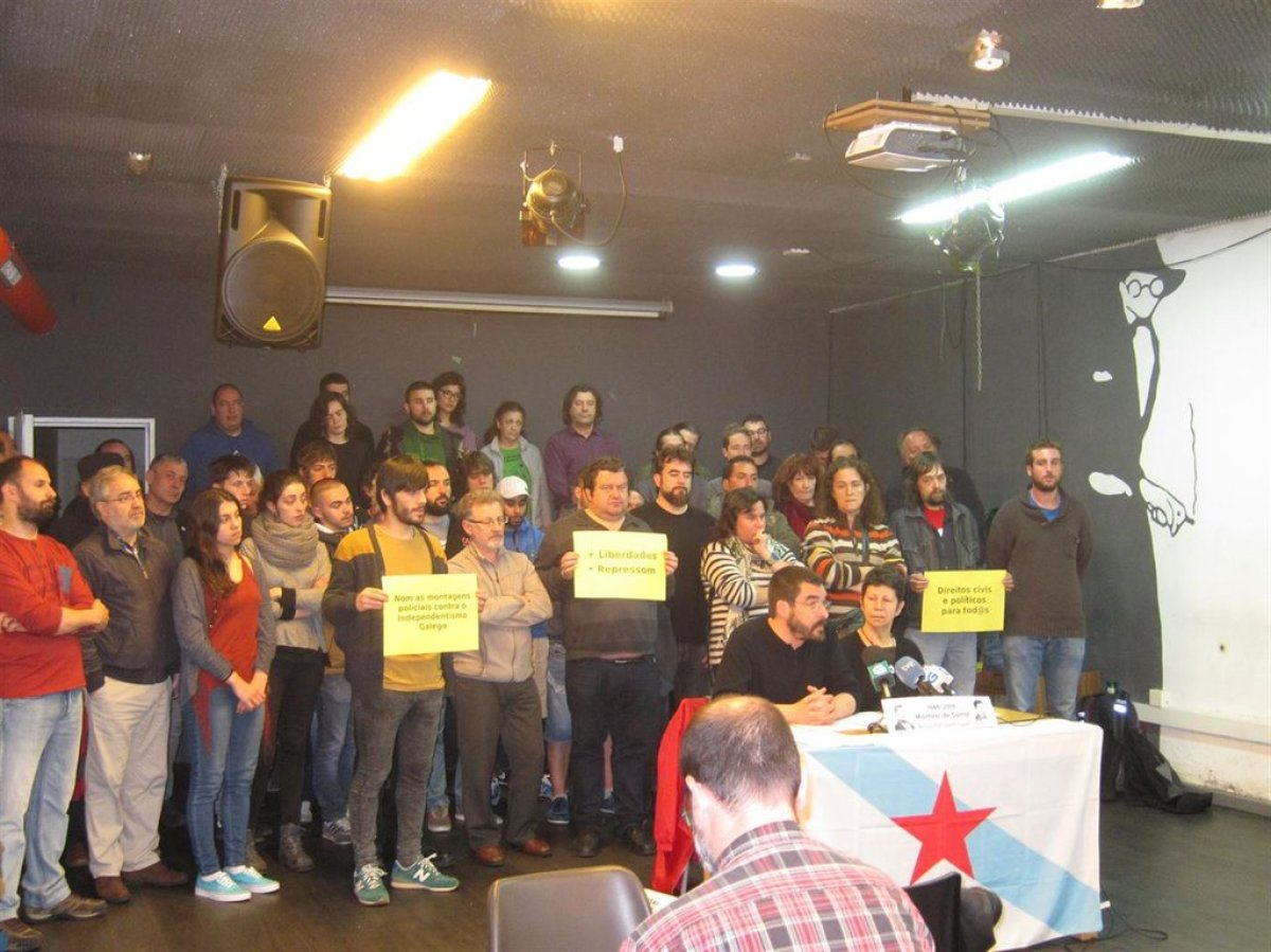 Comparecencia en Santiago pola causa contra Causa Galiza.